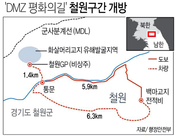 윤병노, 'DMZ 평화의 길' 철원 구간 추가 개방 : 6월부터 전체 15㎞ 거리… 화살머리고지 인근 비상주 GP 견학 가능, 2019년 6월, p. 16-17